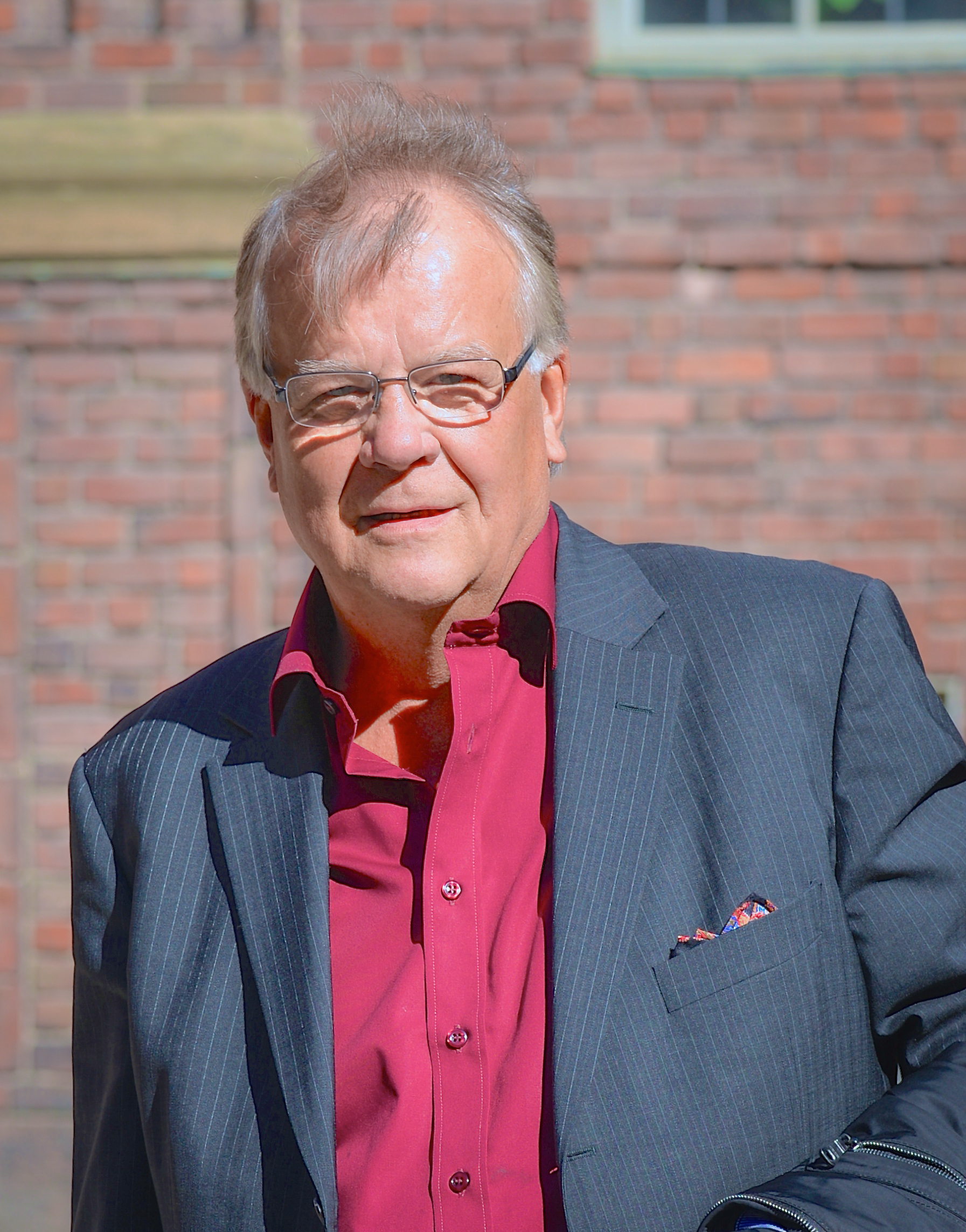 Lasse Berghagen vid Stockholms stadshus den 25 april 2014.